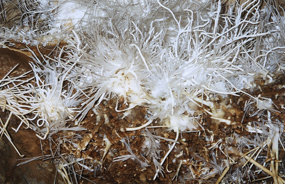 Opis: Aragonit w ochtińskiej jaskini aragonitowej na Słowacji. Skan ze zdjęcia analogowego. Data wykonania zdjęcia: 2003-08-12 Autor: Ml7